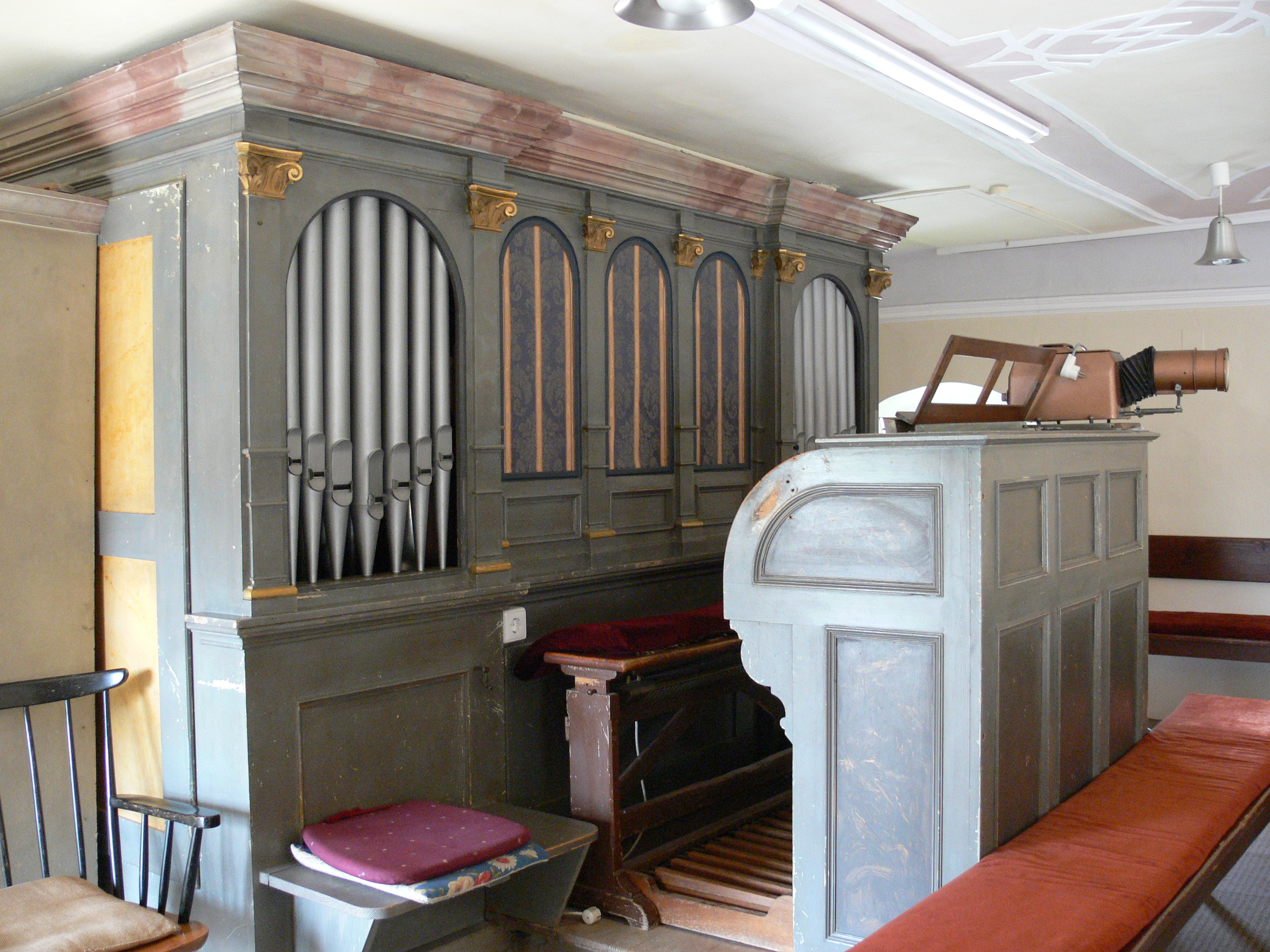 Katholische Pfarrkirche St. Stephanus, Ringgenweiler, Gemeinde Horgenzell, Landkreis Ravensburg Späth-Orgel, op. 152, 1907